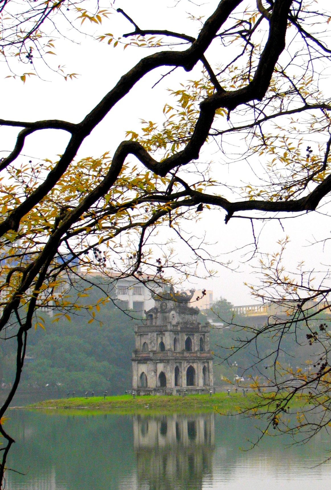 Tháp Rùa giữa hồ Hoàn Kiếm